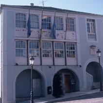 Ayuntamiento de Boal